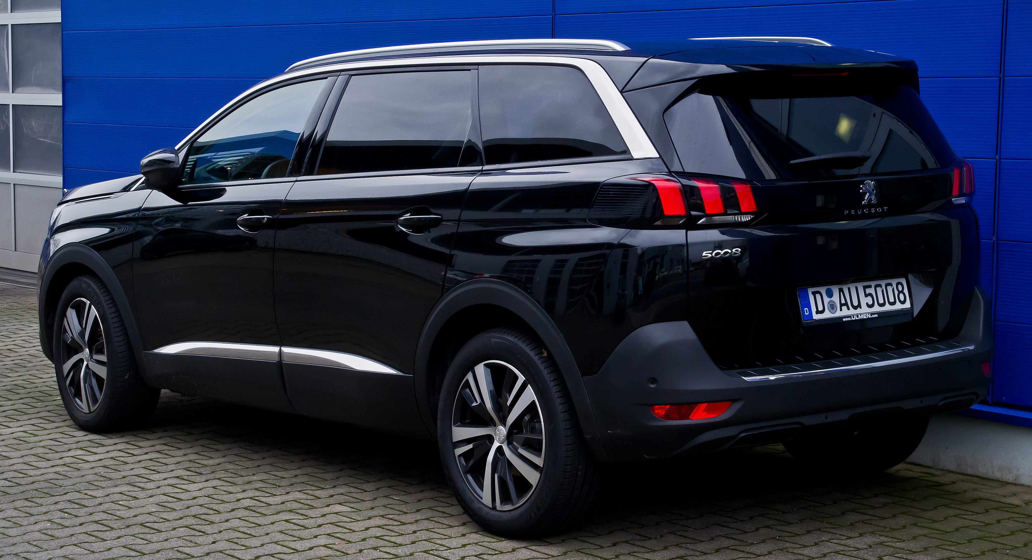 Peugeot 5008 BlueHDi 150 Allure (II)